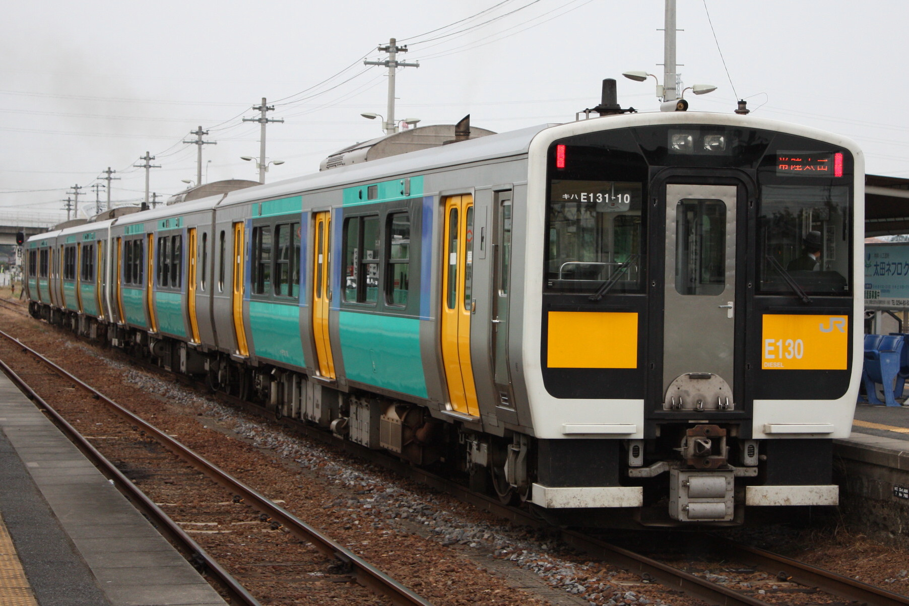 キハE130系 上菅谷にて